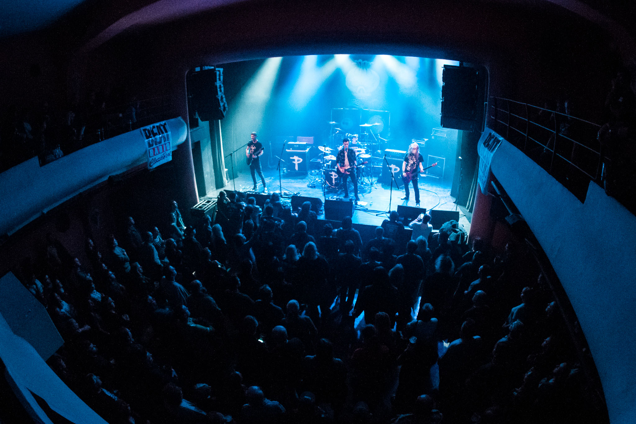 Kapela Frozen Poppyhead - Praha - Palác Akropolis. Vystoupení kapely v rámci Zemětřesení Tour 2018.